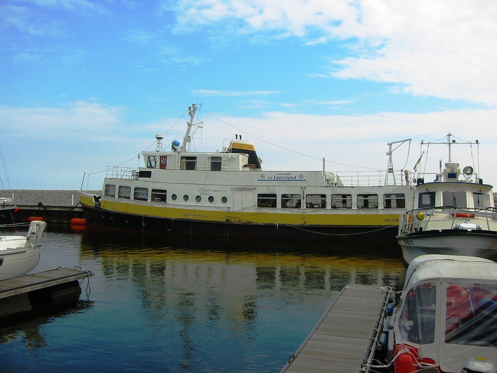 Gastronomieschiff "MS Vaterland" in der Marina Lubmin in Lubmin, einer Gemeinde im Landkreis Ostvorpommern